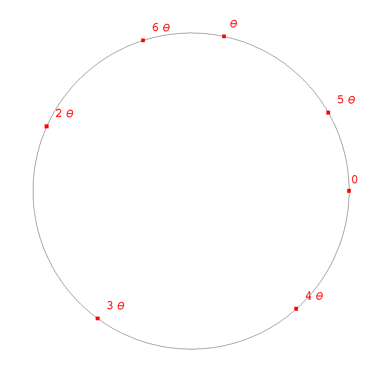 Првих 6 умножака броја θ = 3 / 8 {\displaystyle \theta ={\sqrt {3 /8} модуло 1. Направио Dzordzm у програмском пакету Mathematica.